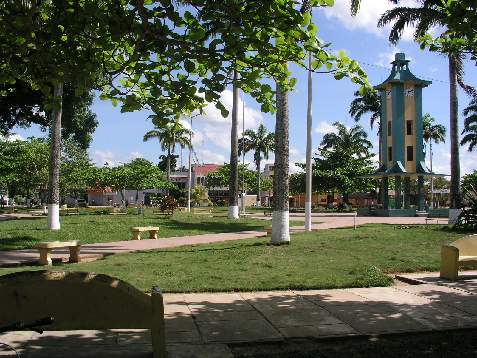 Puerto Maldonado, Plaza de Armas, Peru.